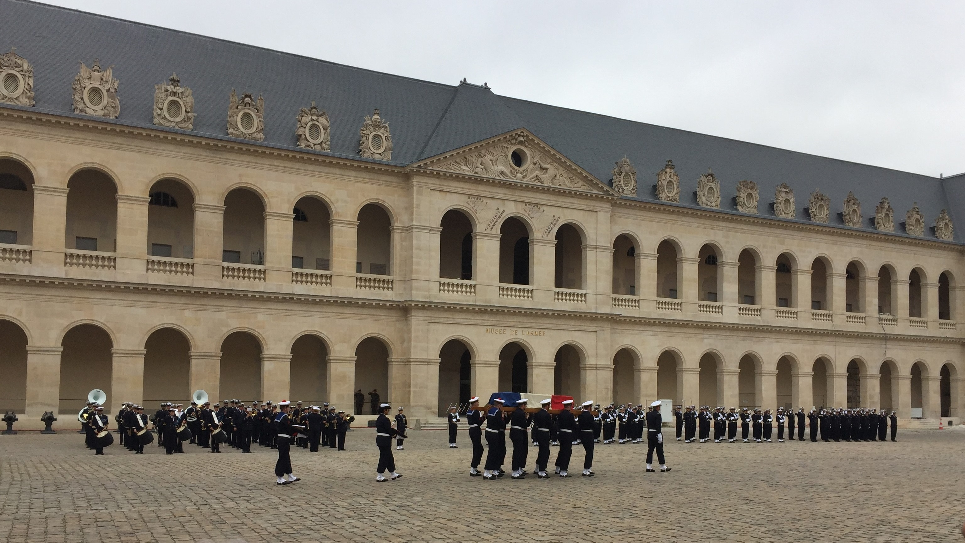 Hommage militaire à un Amiral de la marine française